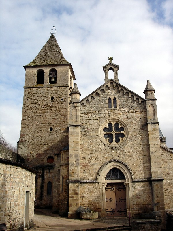 L'église de Saint-Beauzély (Aveyron)